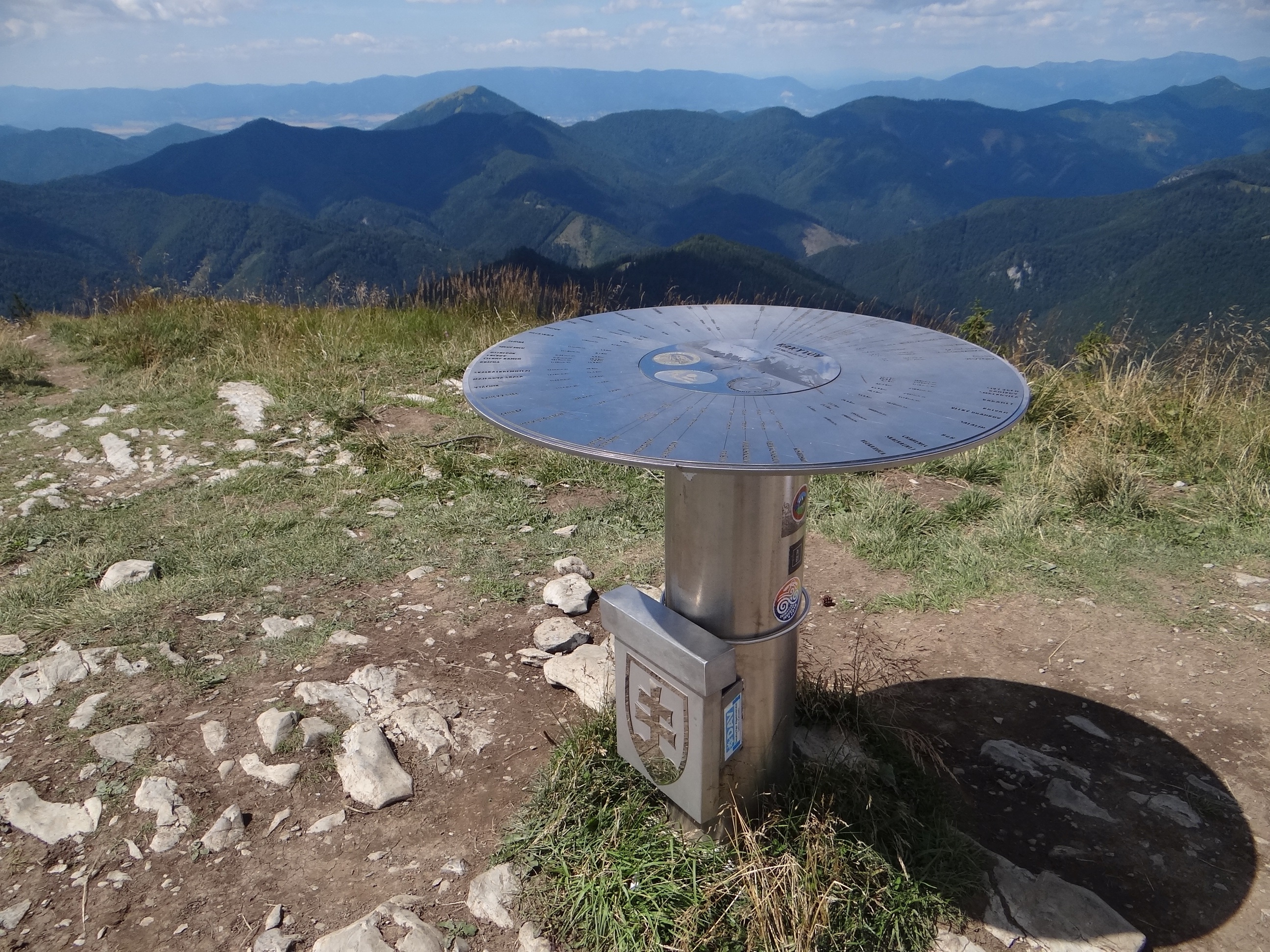 Rakytov